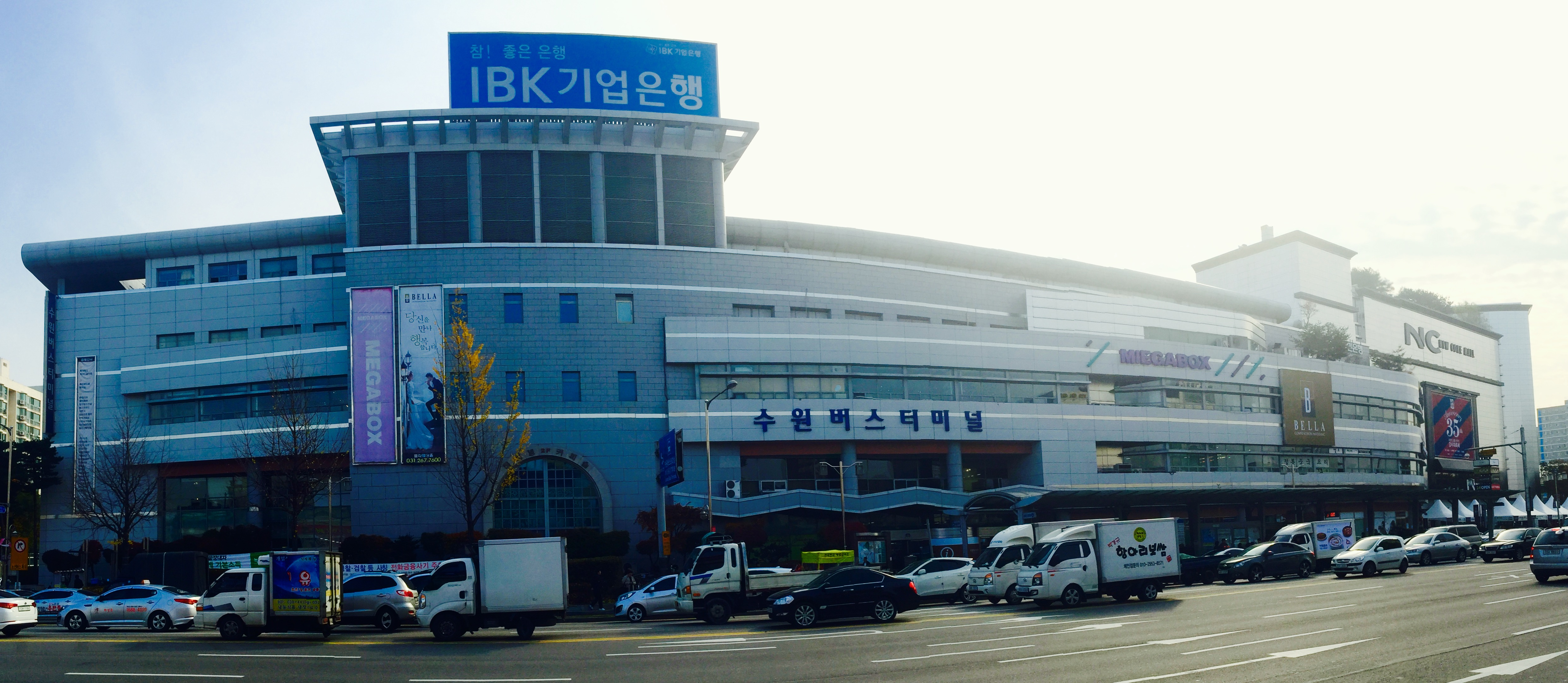 대한민국 경기도 수원시 수원종합버스터미널